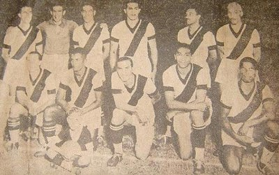 Equipe do Club de Regatas Vasco da Gama de 1938.